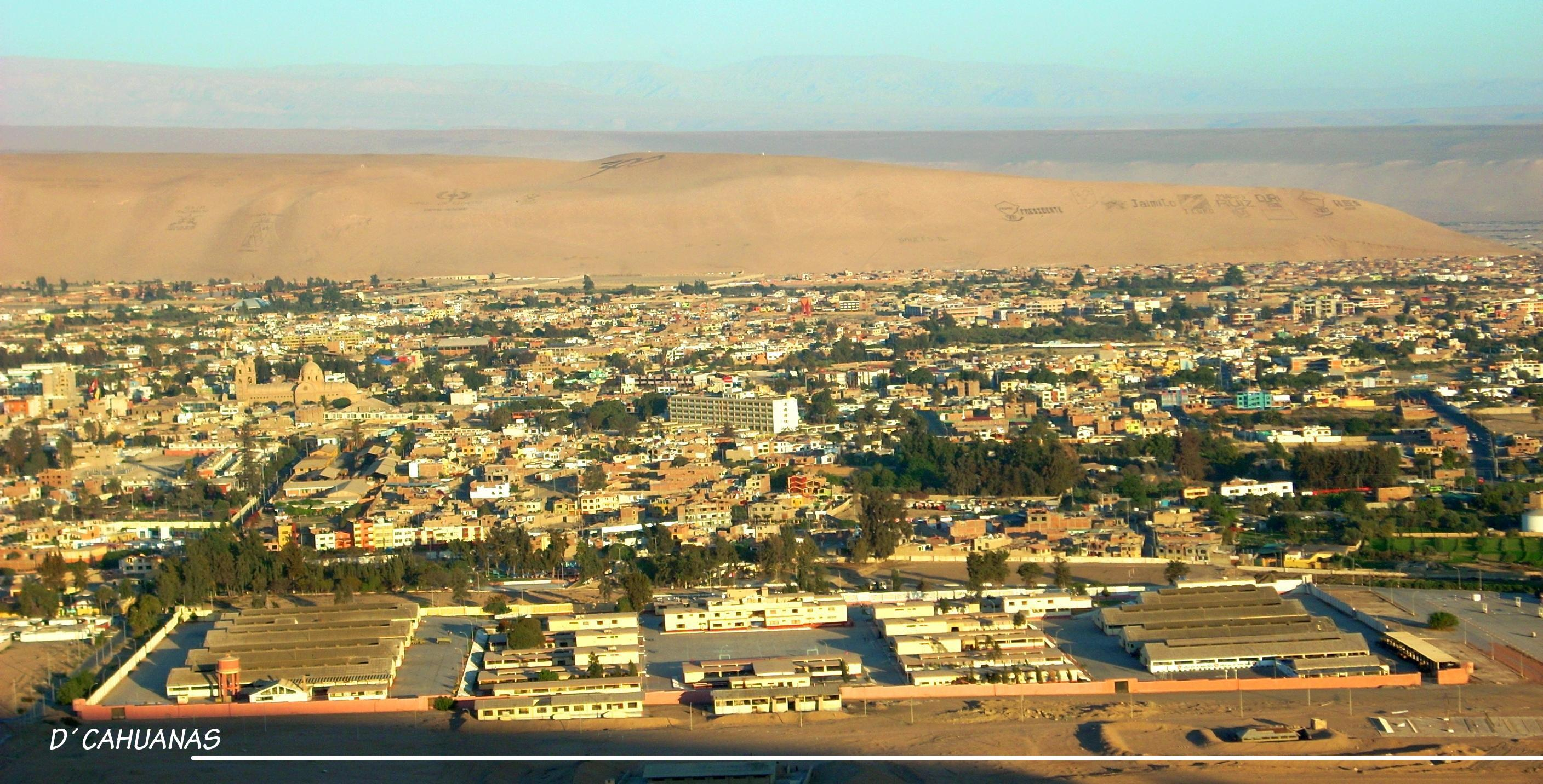 panoramica de tacna